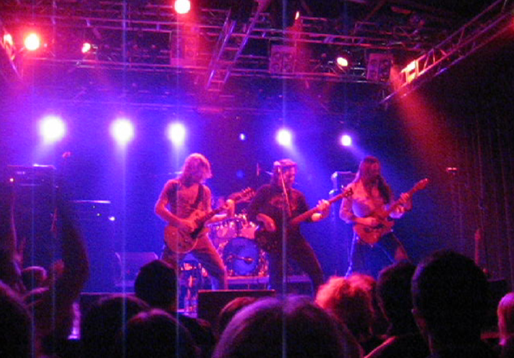 Winger Nosturissa 15.10.2006